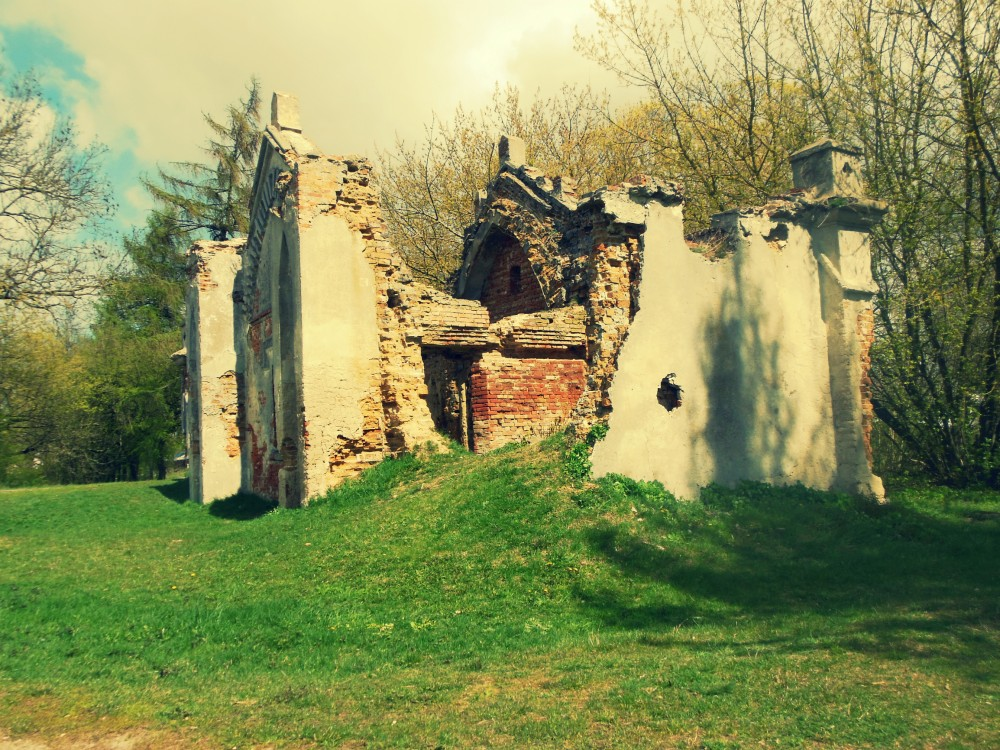 Западные ворота. Усадьба в Песках.